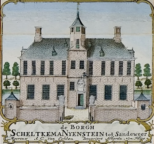 Borg Scheltkema-Nijenstein in Zandeweer. Uitsnede uit de kaart van Theodorus Beckeringh uit 1781